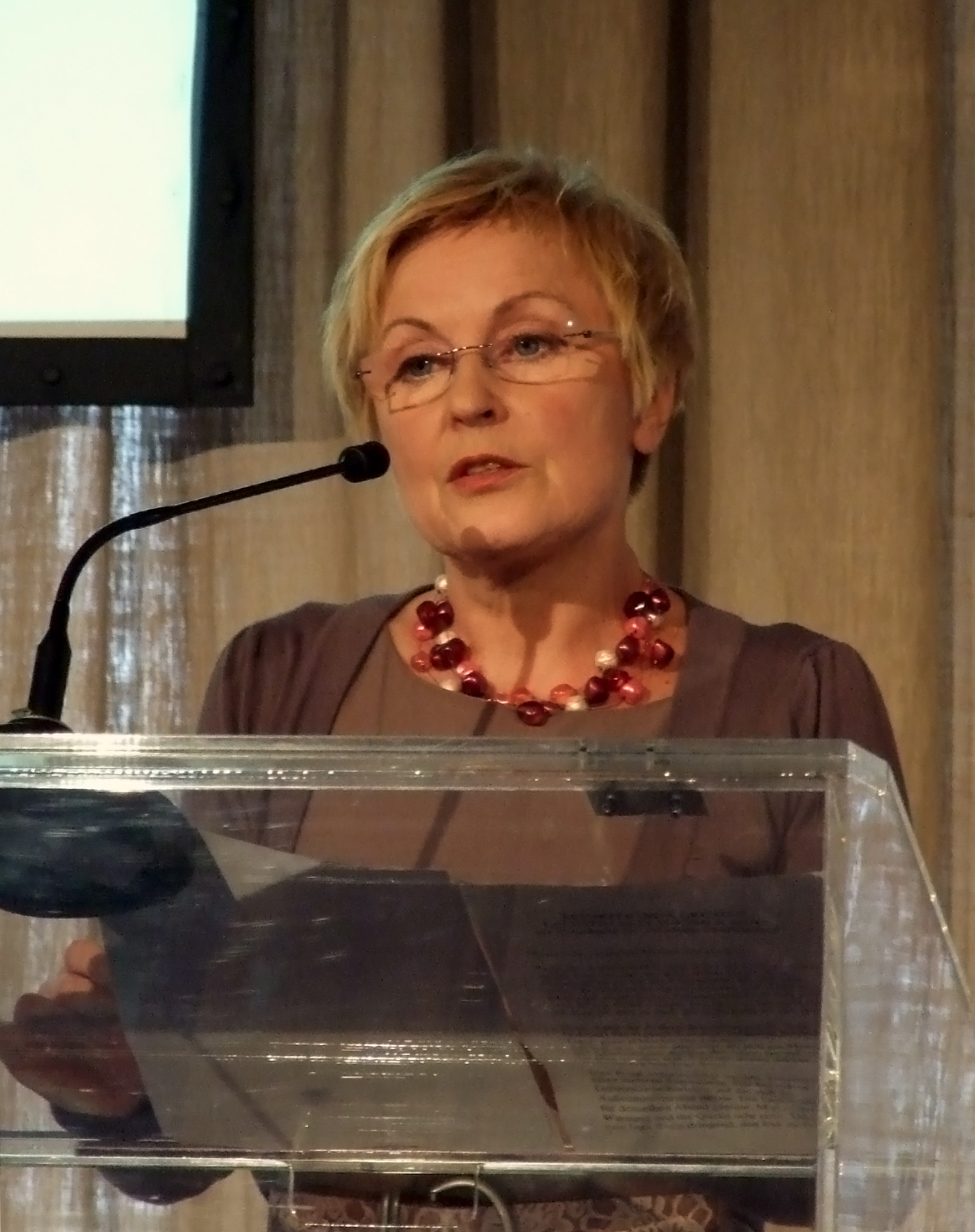 Bascha Mika bei der Laudatio zur Karlsmedaille für europäische Medien 2009